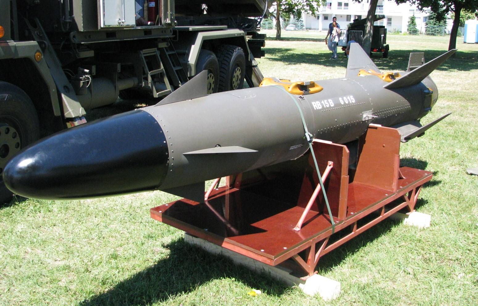 Protubrodska raketa RBS 15